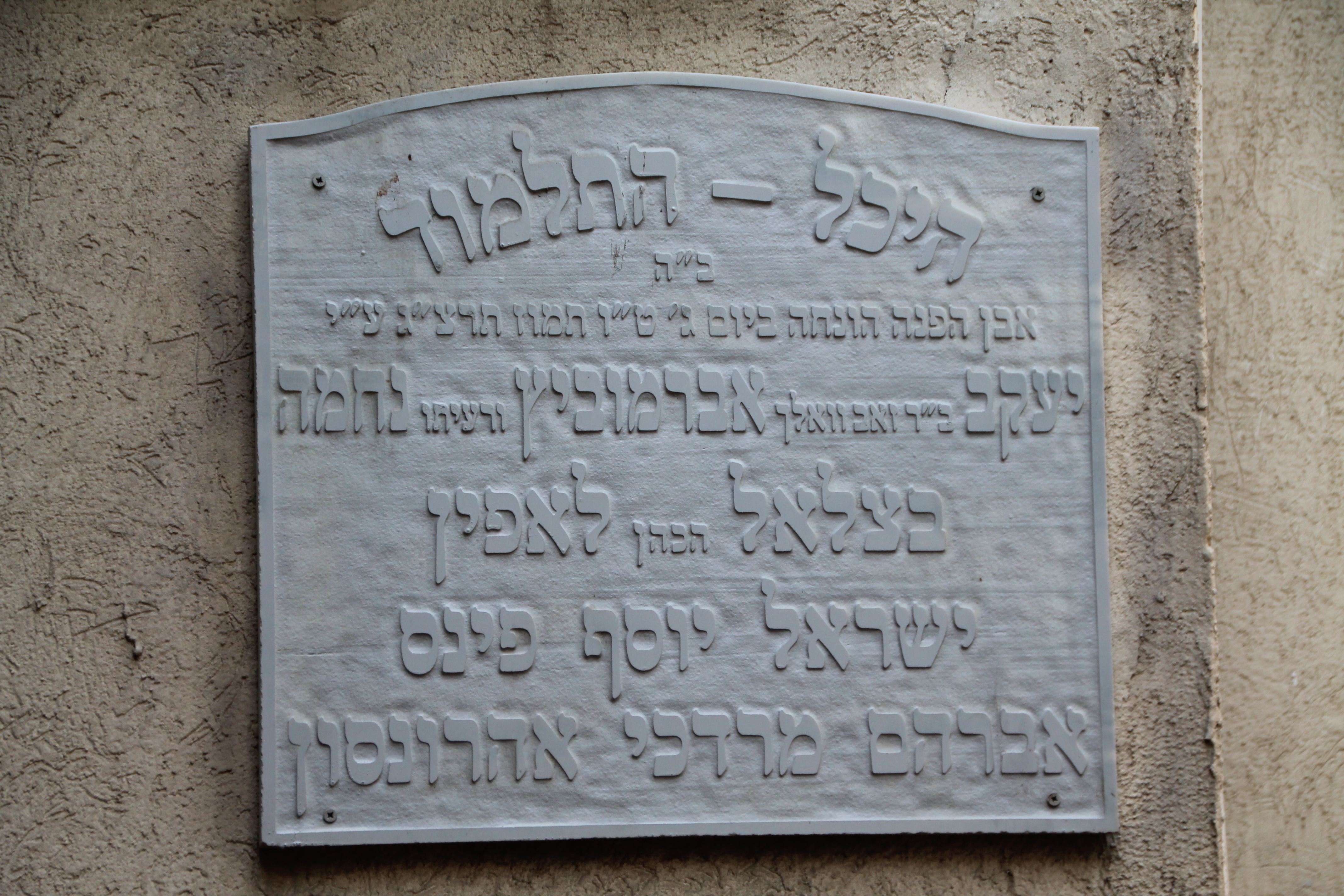 יד זיכרון בהיכל התלמוד ת"א